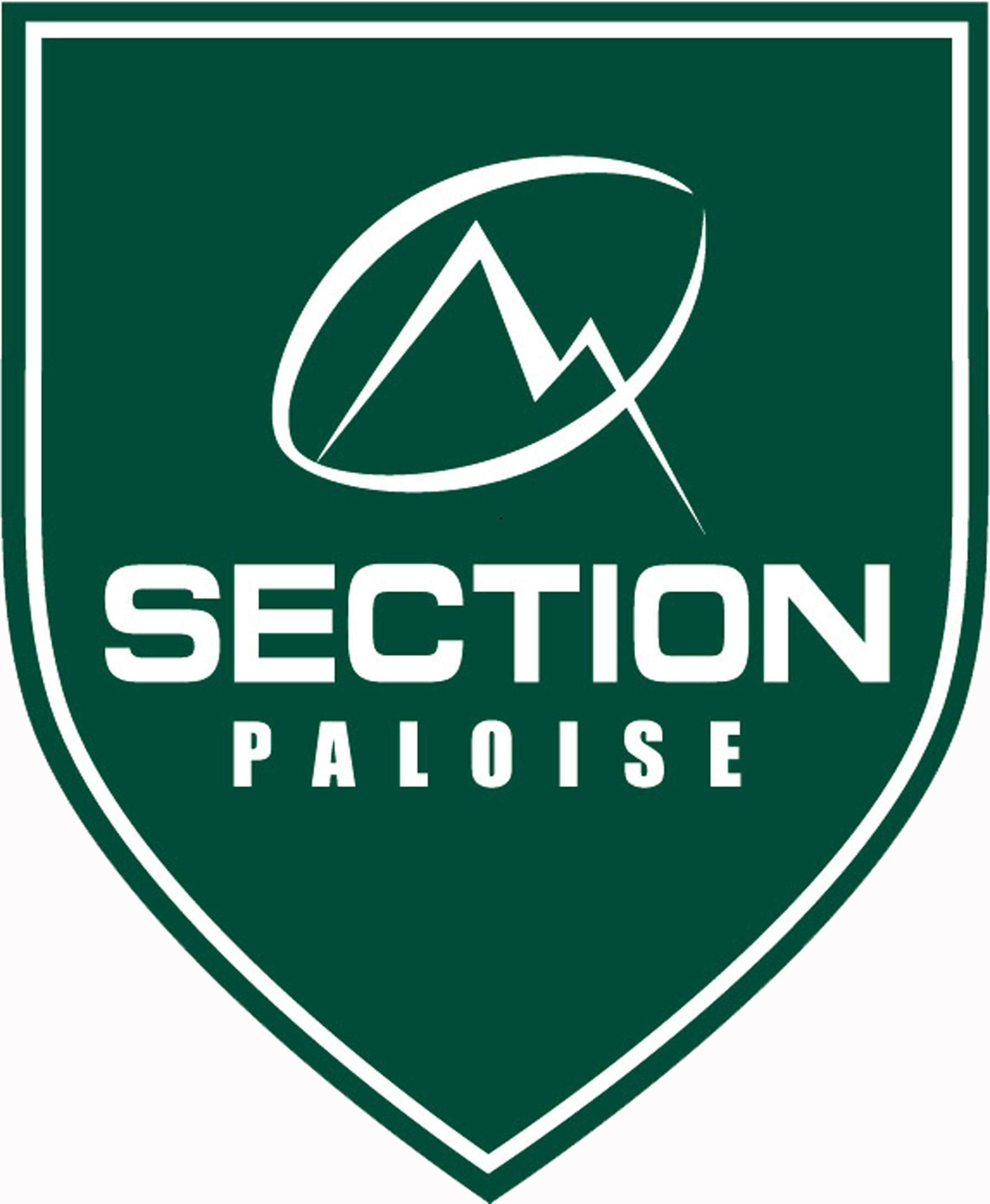 Ancien logo de la Section paloise (rugby à XV)